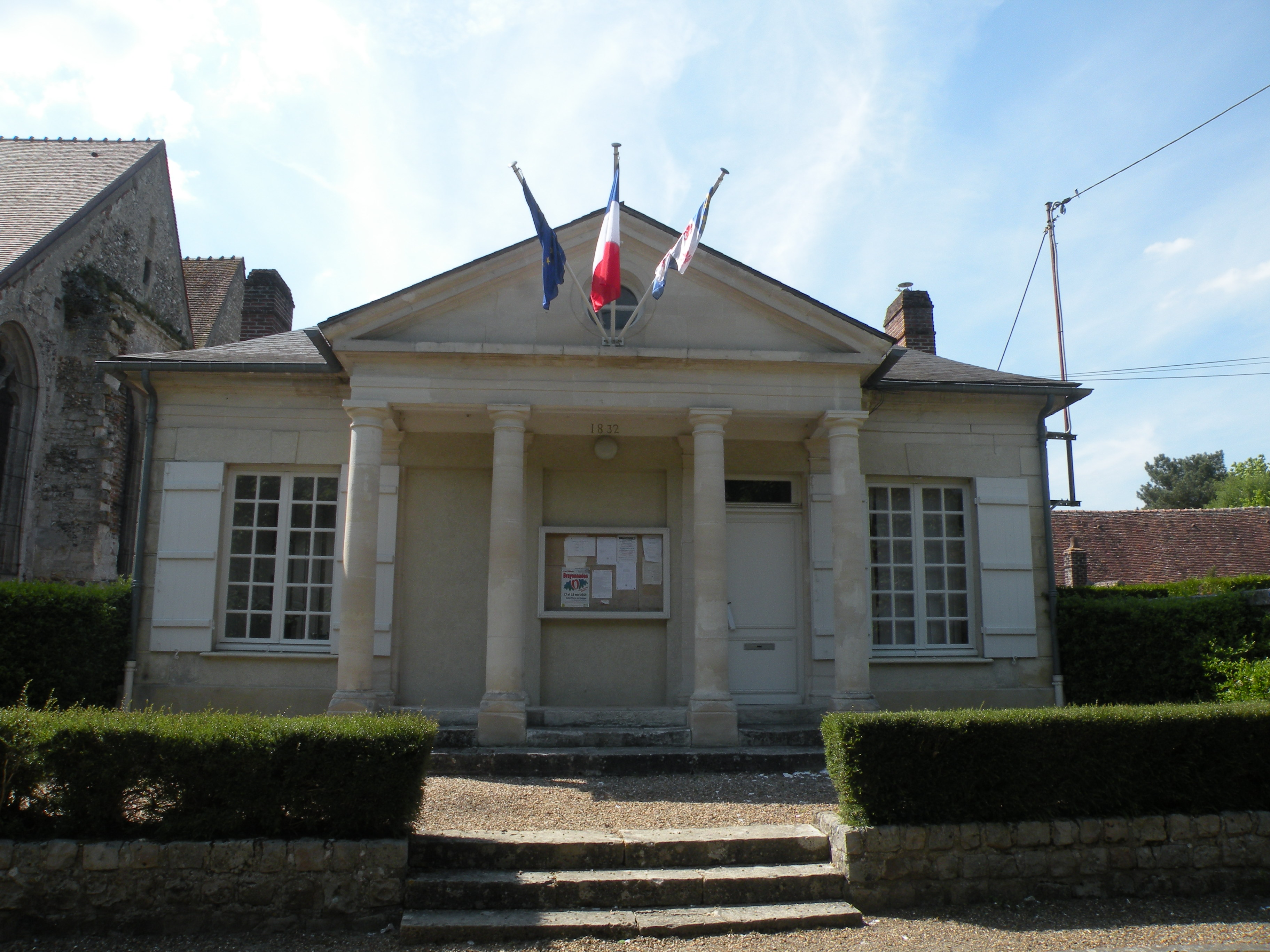 Flavacourt, Oise, France, la mairie.